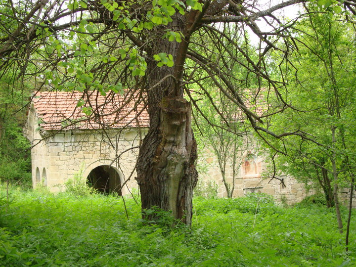 По своему уникална.